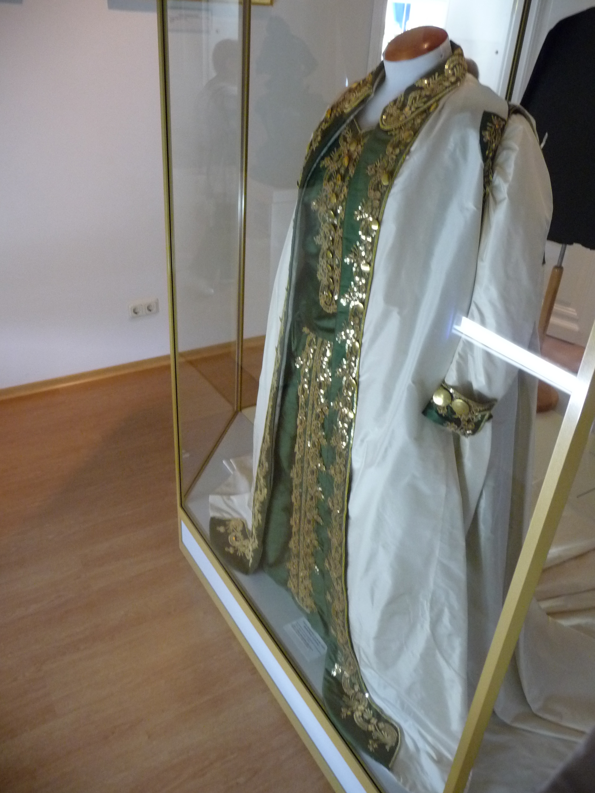 PalaceSailorMuseum-p1030880.jpg